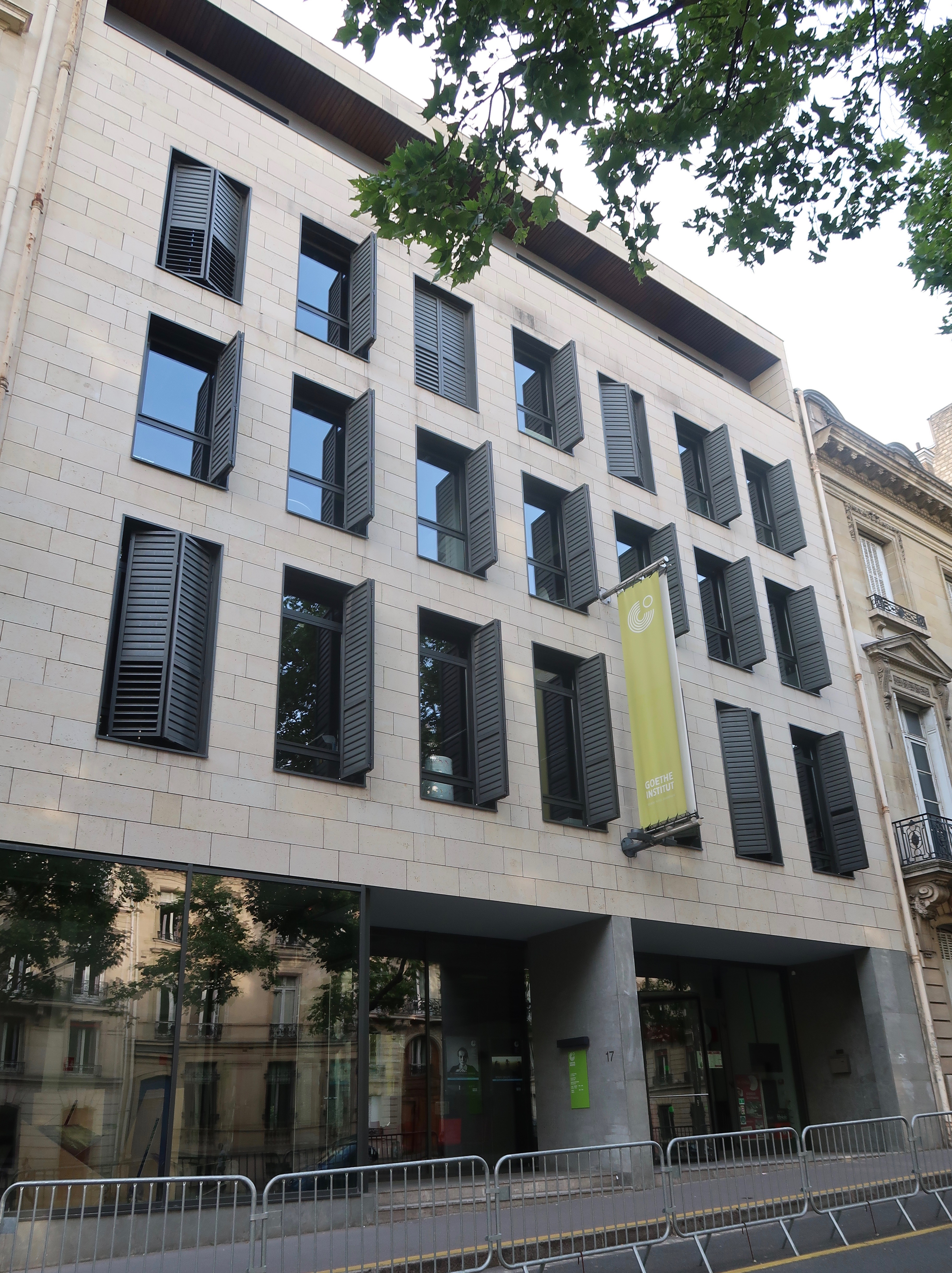 Institut Goethe, n°17 avenue d'Iéna (Paris, 16e).